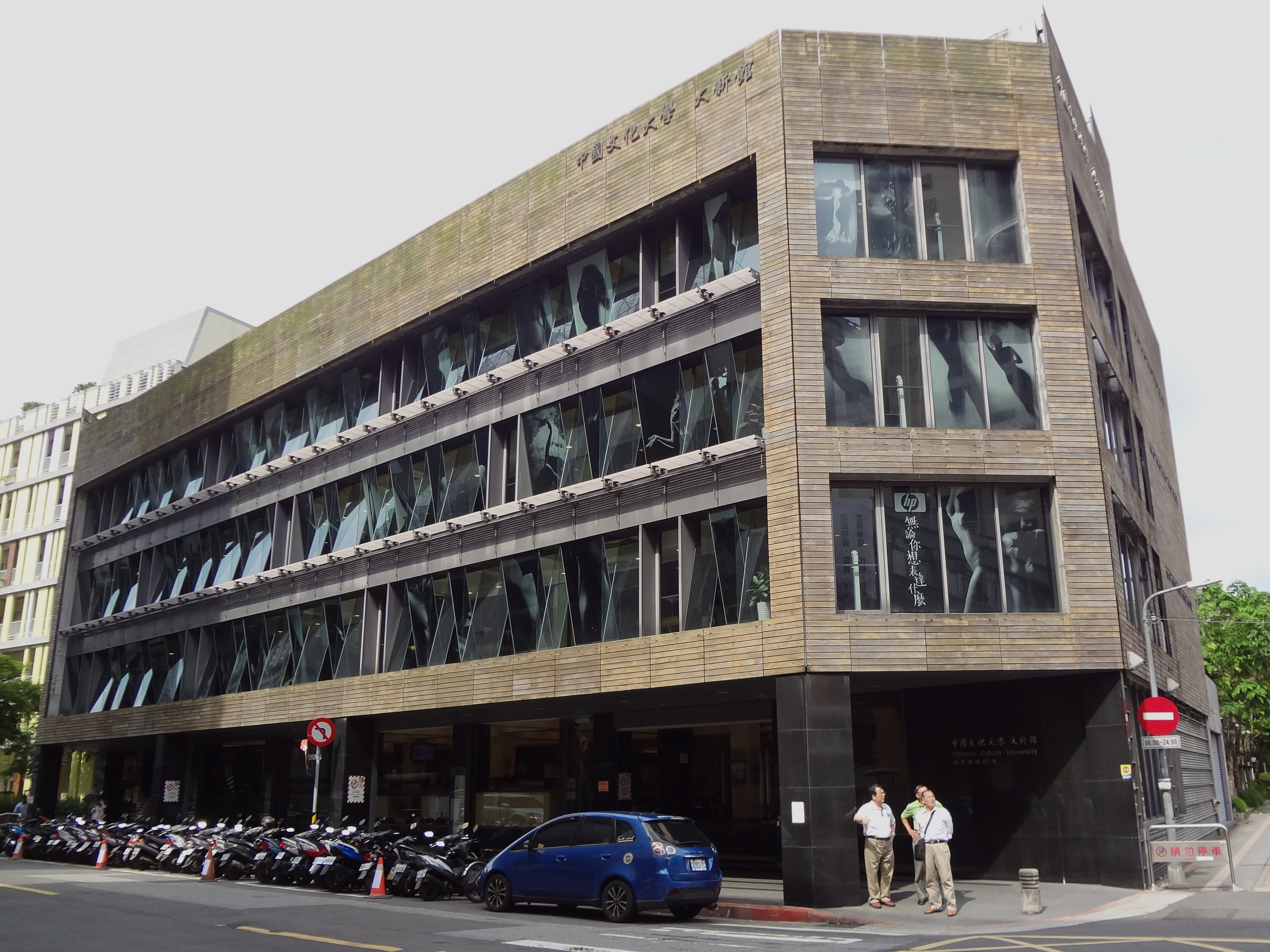 中國文化大學大新館，位於臺北市中正區延平南路127號。